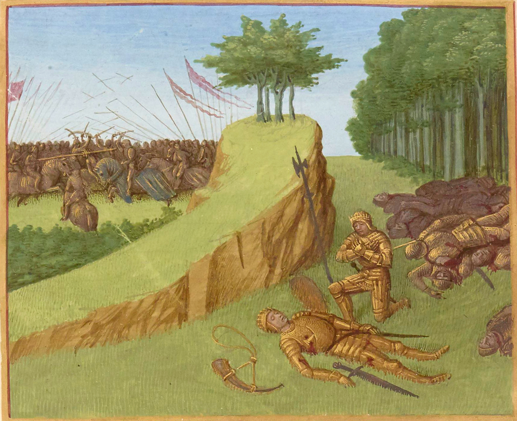 Bataille de Roncevaux en 778. Mort de Roland Grandes Chroniques de France, enluminées par Jean Fouquet, Tours, vers 1455-1460 Paris, BnF, département des Manuscrits, Français 6465, fol. 113 (Cinquième Livre de Charlemagne). Bataille de Roncevaux en 778 (en arrière-plan à gauche) : Au retour de l'expédition d'Espagne, l'arrière-garde de l'armée de Charlemagne, conduite par Roland, est attaquée par les sarrasins dans la vallée de Roncevaux. Mort de Roland : Le neveu de Charlemagne, Roland, comte de la Marche de Bretagne, gît sur l'herbe. Auprès de lui, son frère Baudouin se lamente avant de prendre l'olifant et l'épée Durandal de Roland pour les porter à l'empereur.